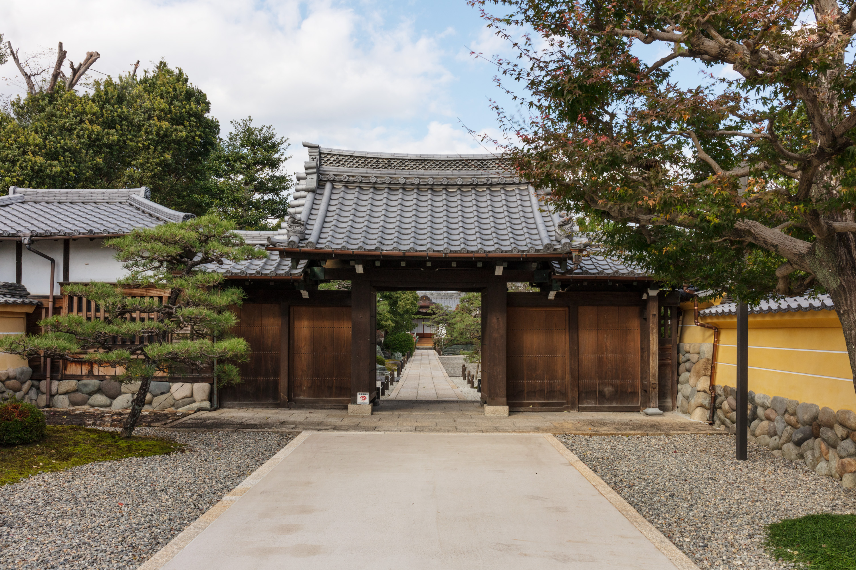 崇福寺 (岐阜市)